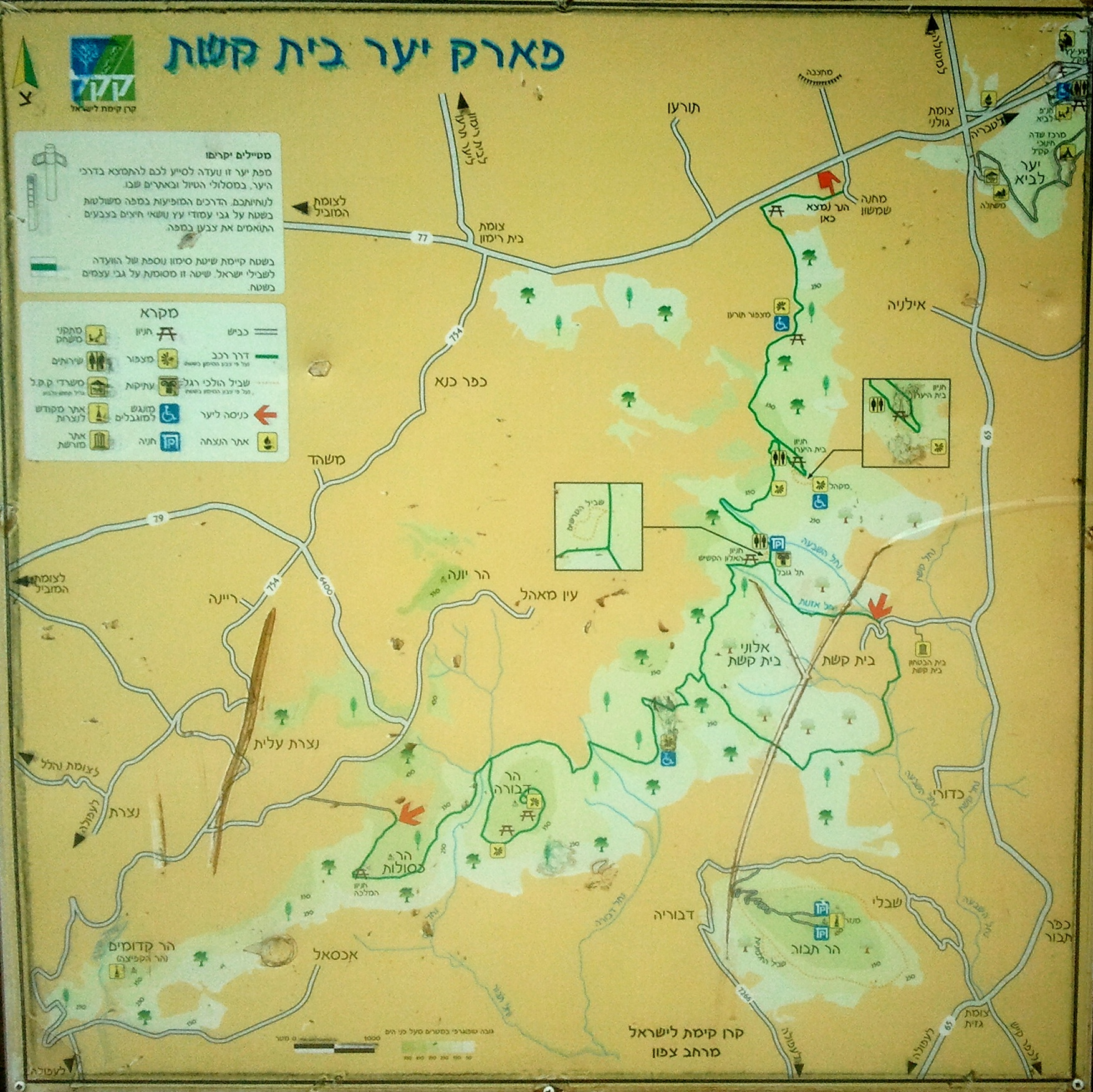 דרך נוף בית קשת היא דרך נופית בגליל התחתון